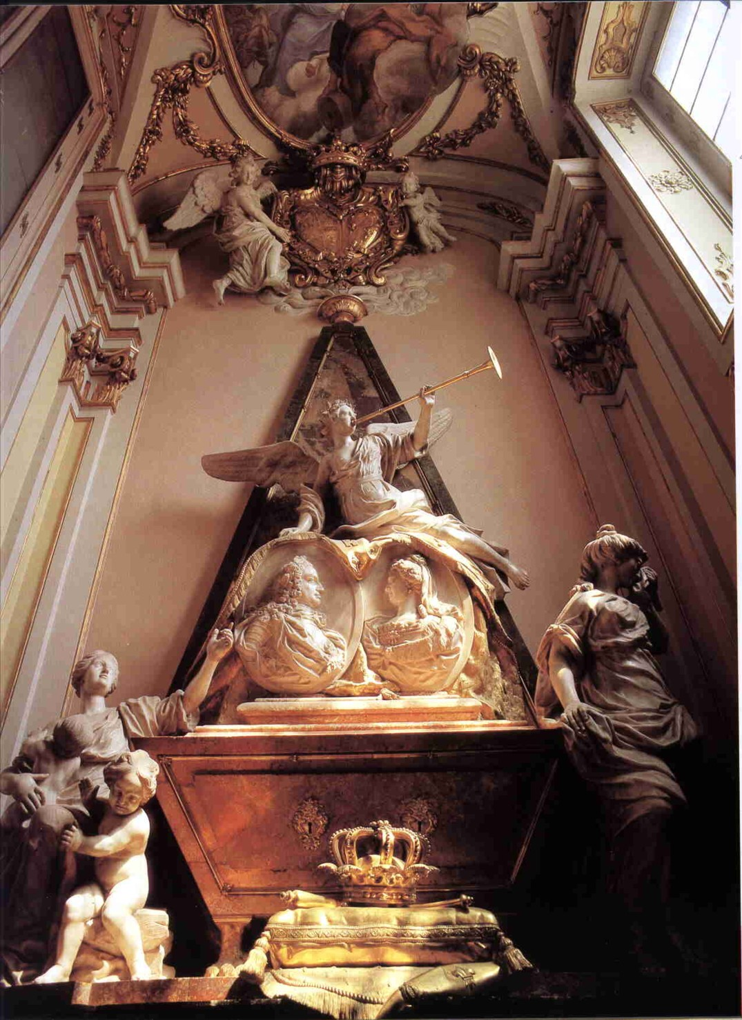 Tumba de Felipe V e Isabel de Farnesio, en la colegiata de La Granja de San Ildefonso